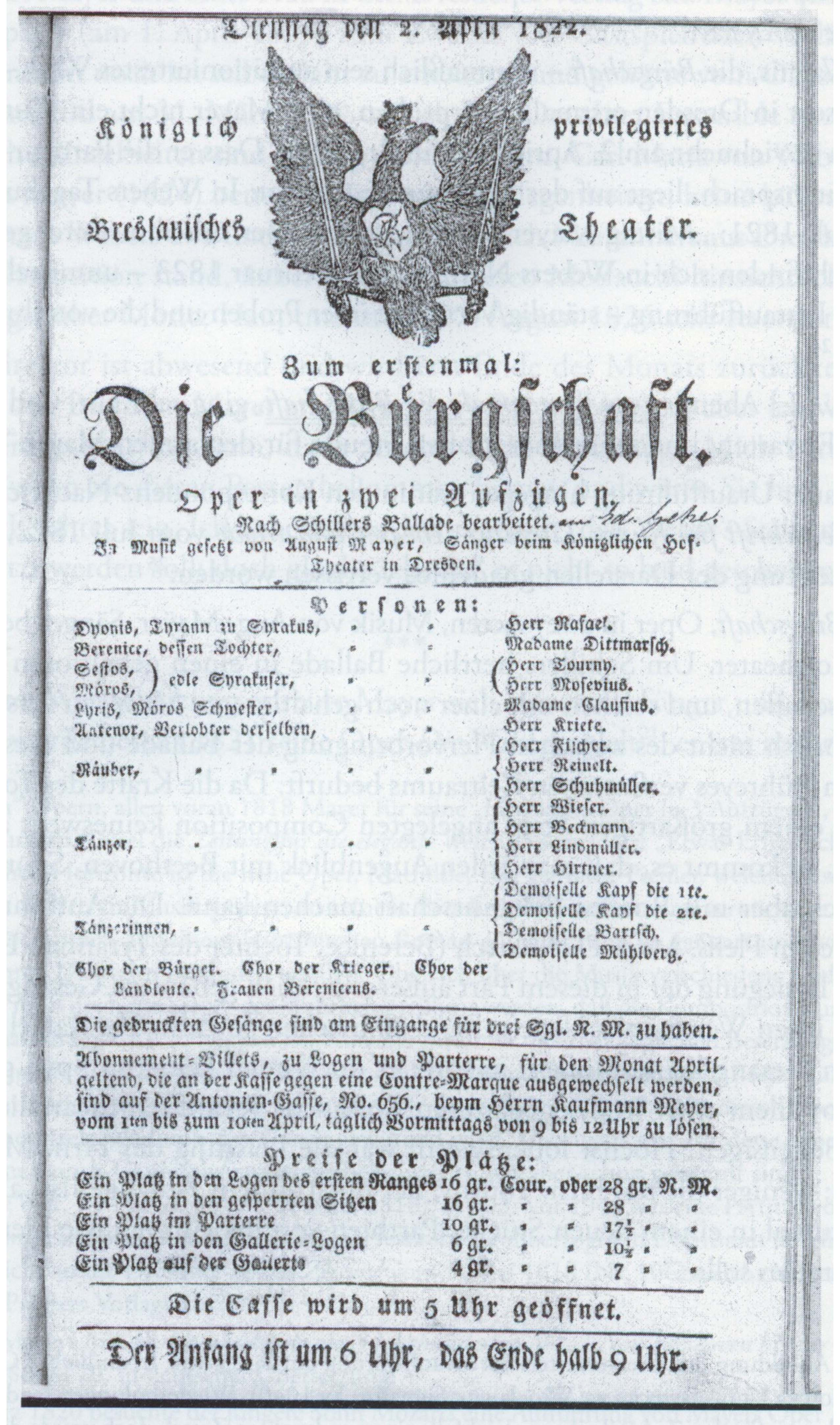 Theaterzettel Breslau 1822 F. L. August MAYER: Die Bürgschaft